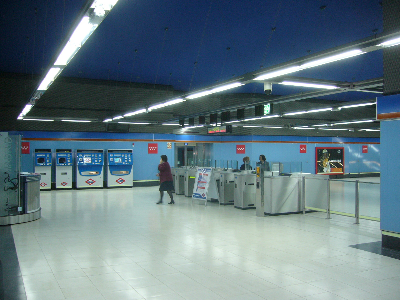 Taquillas de la parada de metro de Manoteras en Madrid. Metro stop ticket machines in Manoteras, Madrid